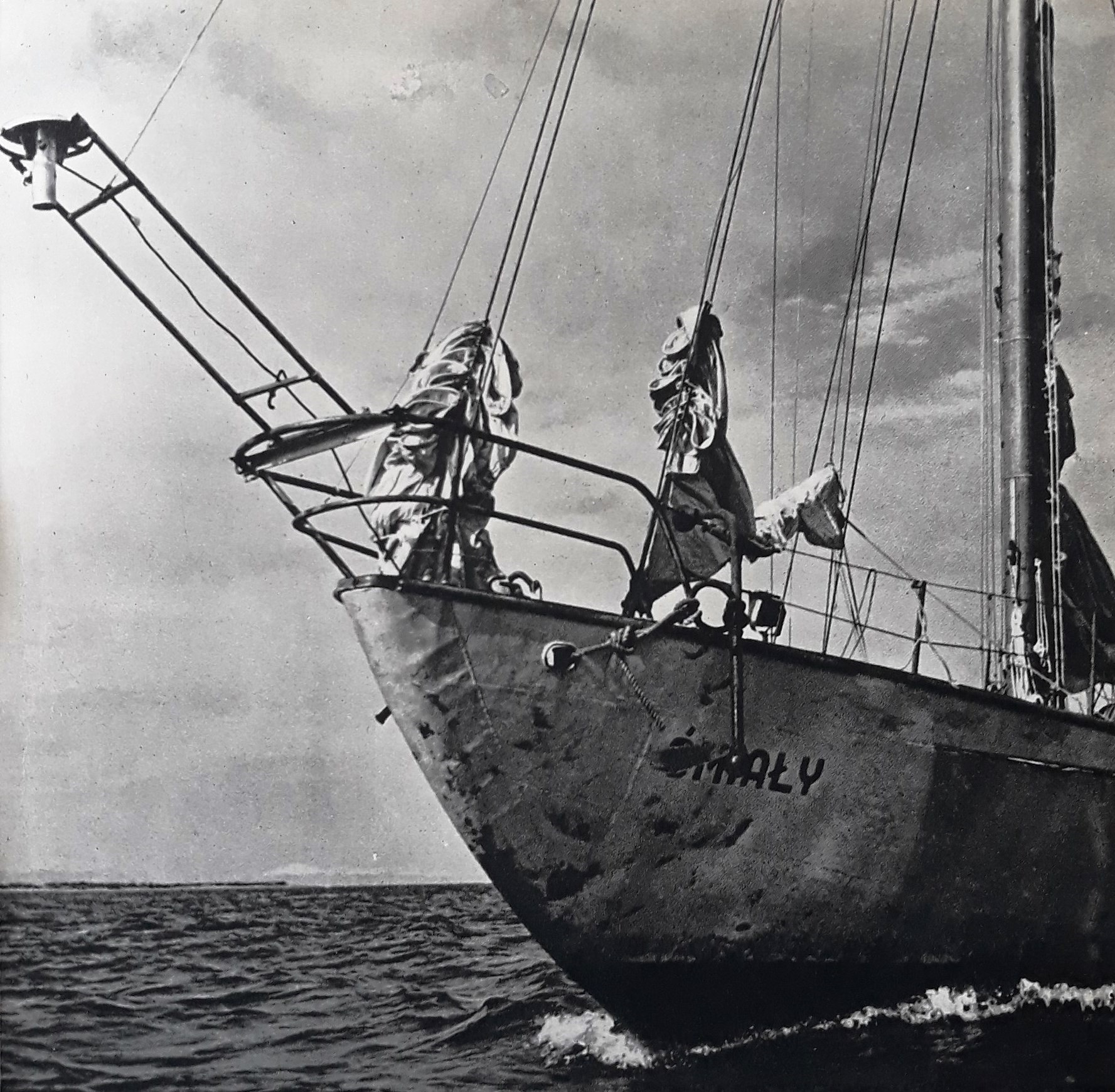 Pomiary bilansu promieniowania słonecznego, na dziobie widoczny zamocowany albedomierz